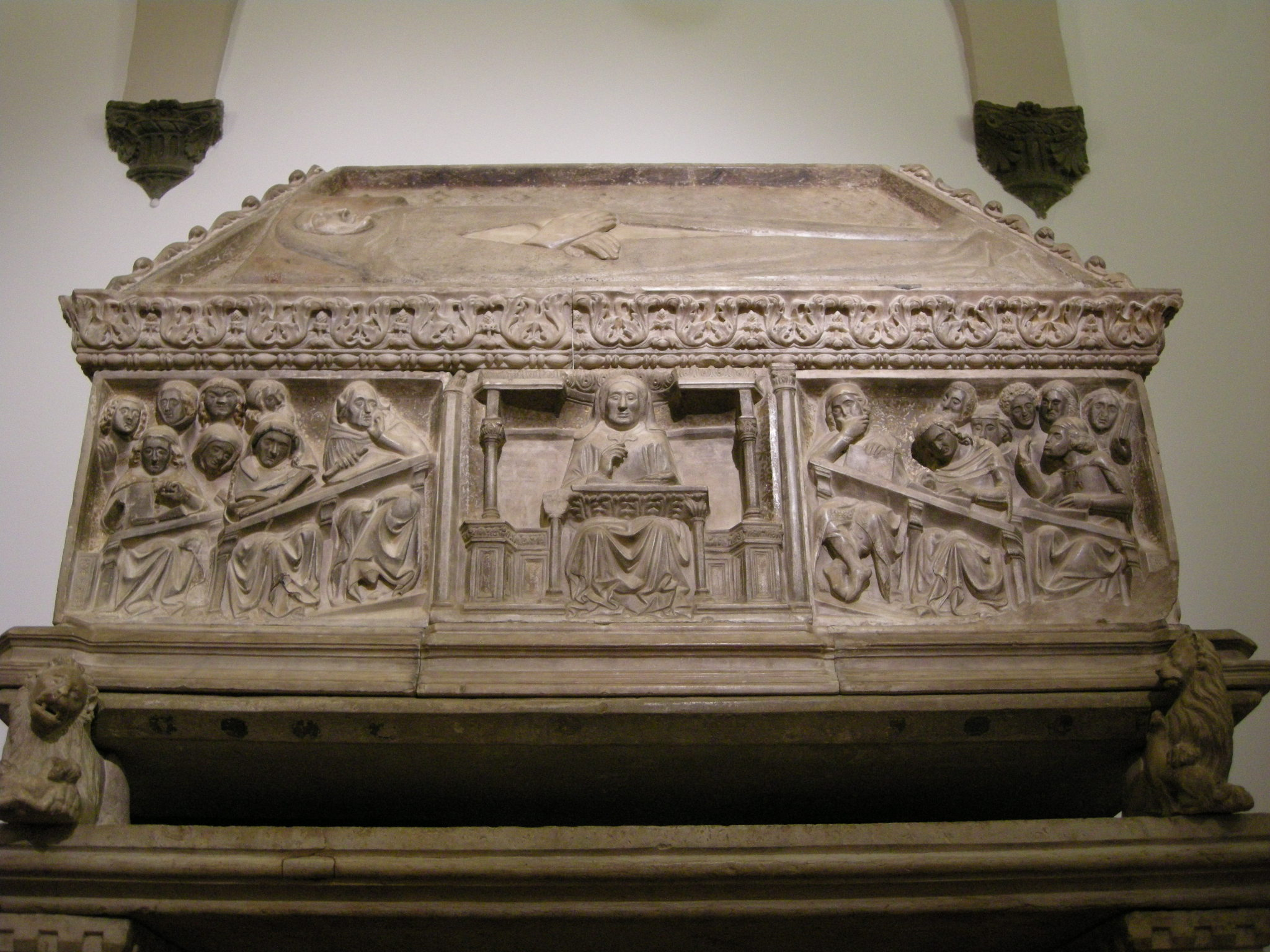 Sepolcro di Giovanni di Andrea (+ 1348), oggi esposto nel Museo civico medievale a Bologna.